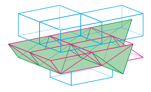 Al4Ba